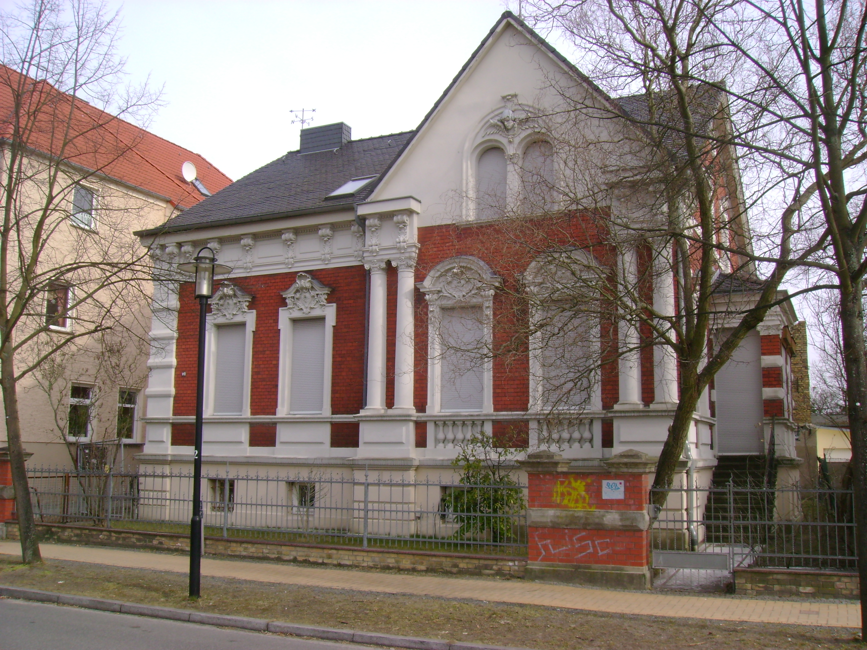 Denkmalgeschütztes Wohnhaus in Velten Schulstraße 3